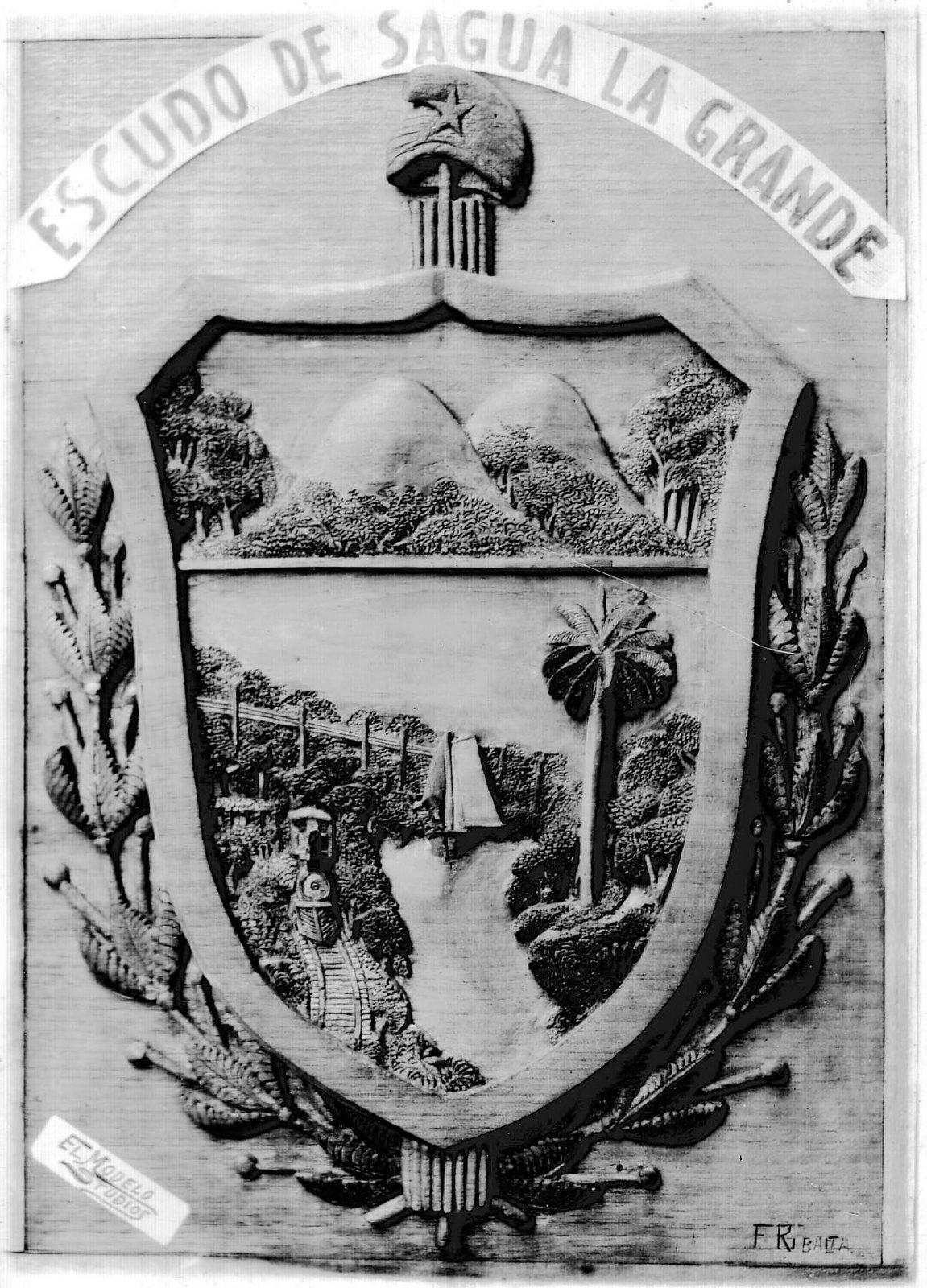 Escudo de la ciudad de Sagua la Grande.